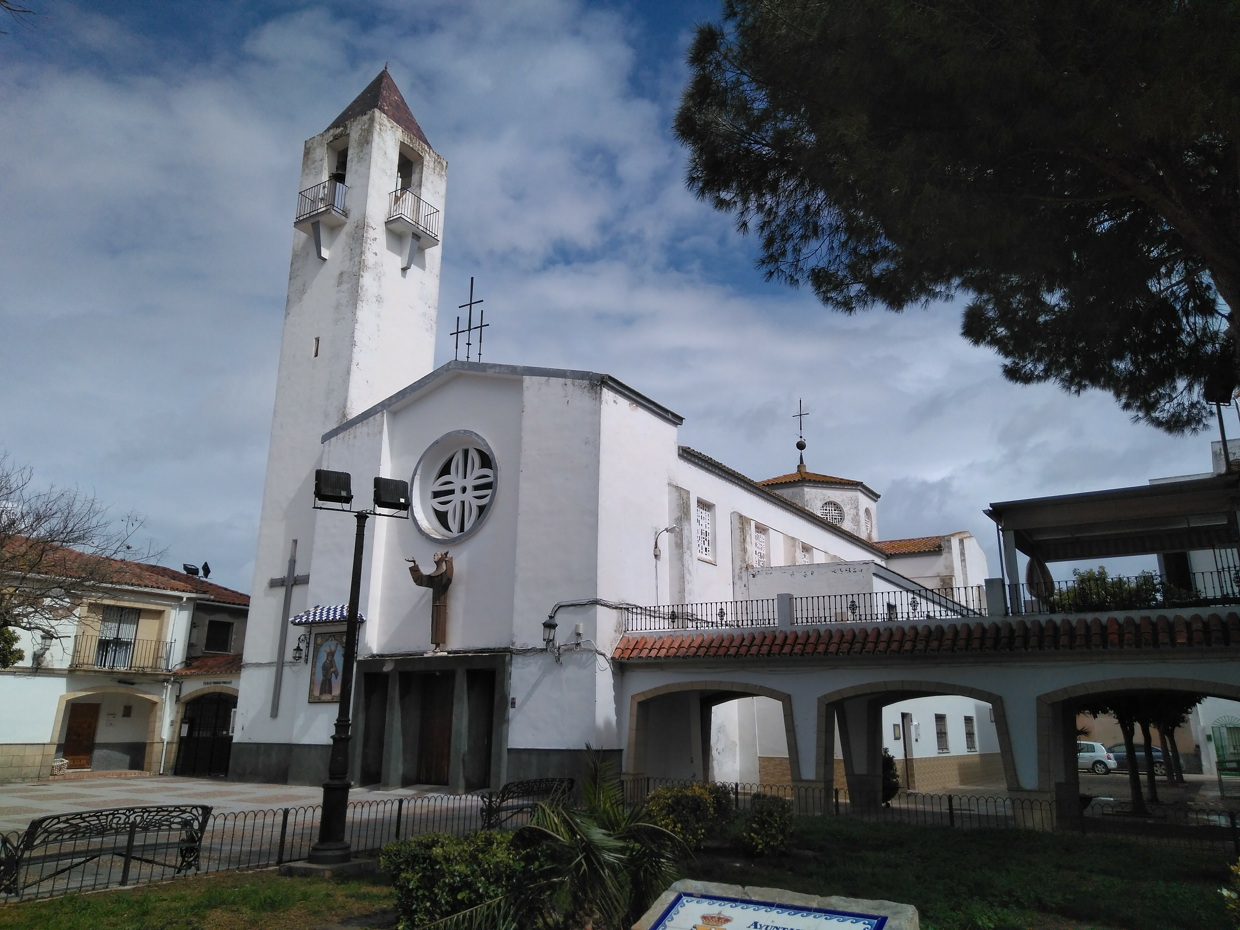 Vista de frente y lateral de Iglesia Parroquial de San San Enrique y Santa Teresa de Guadalcacín, Jerez de la Frontera